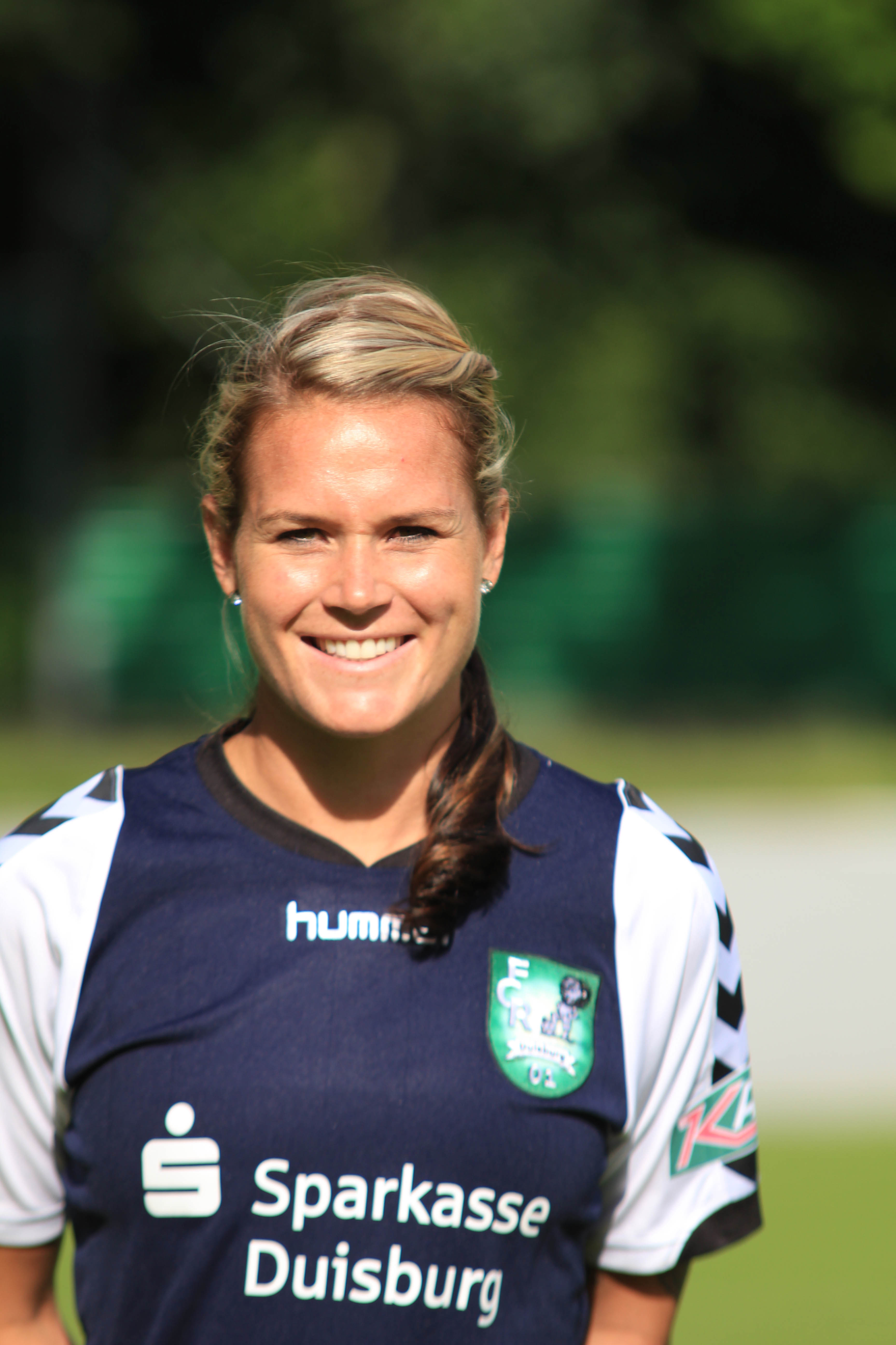 Ashlyn Harris, FCR 2001 Duisburg